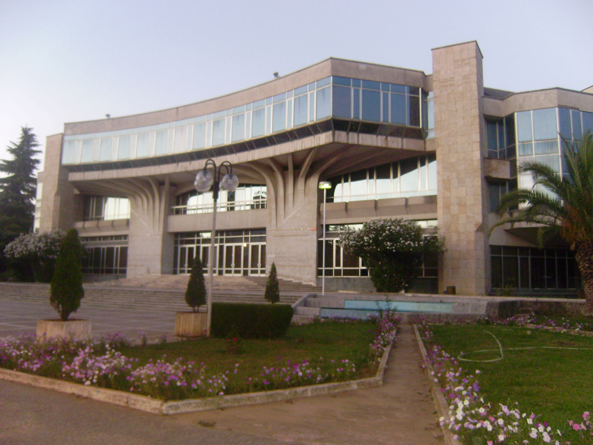 kongre2011